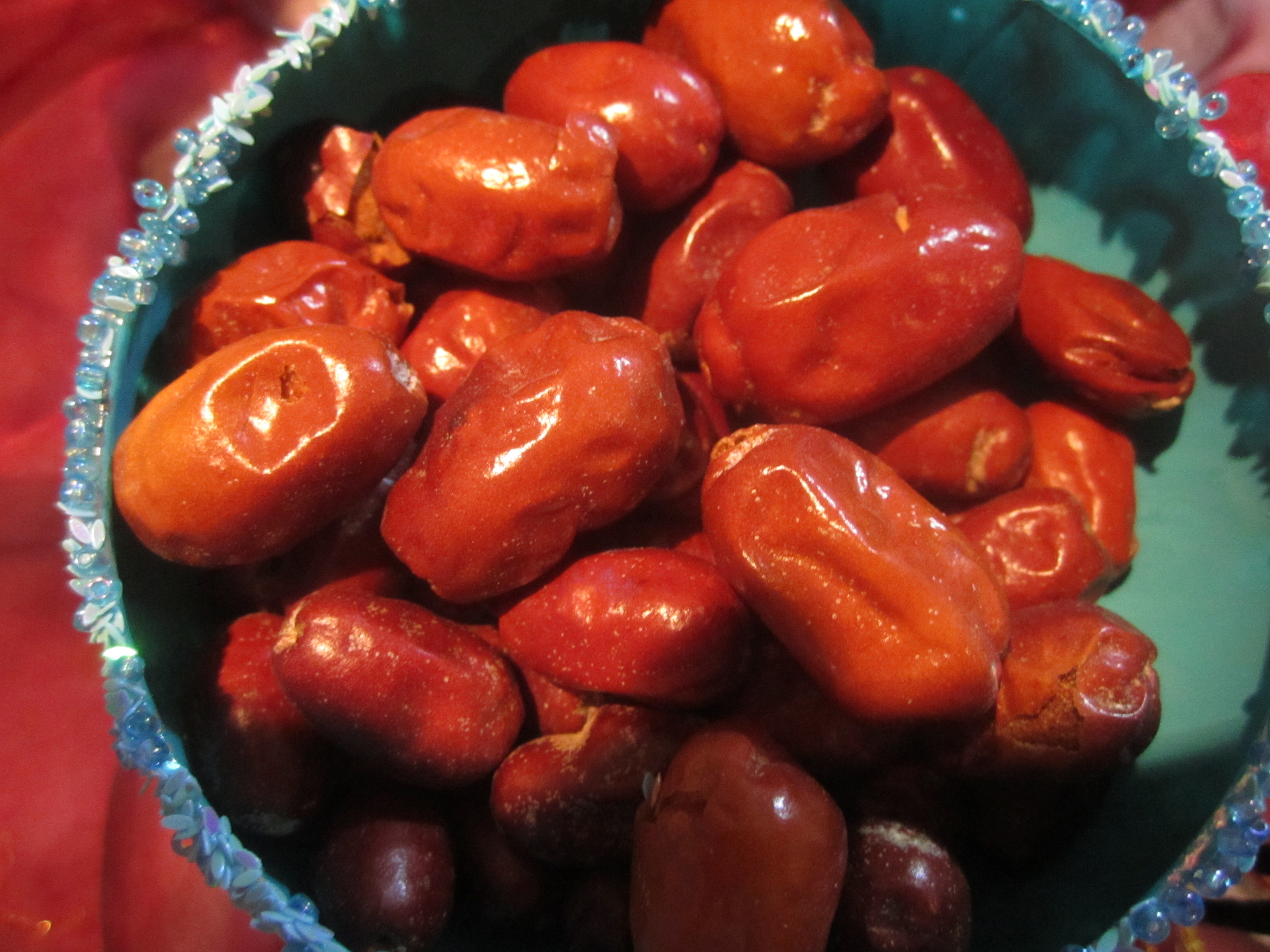 Die Früchte der schmalblättrigen Ölweide